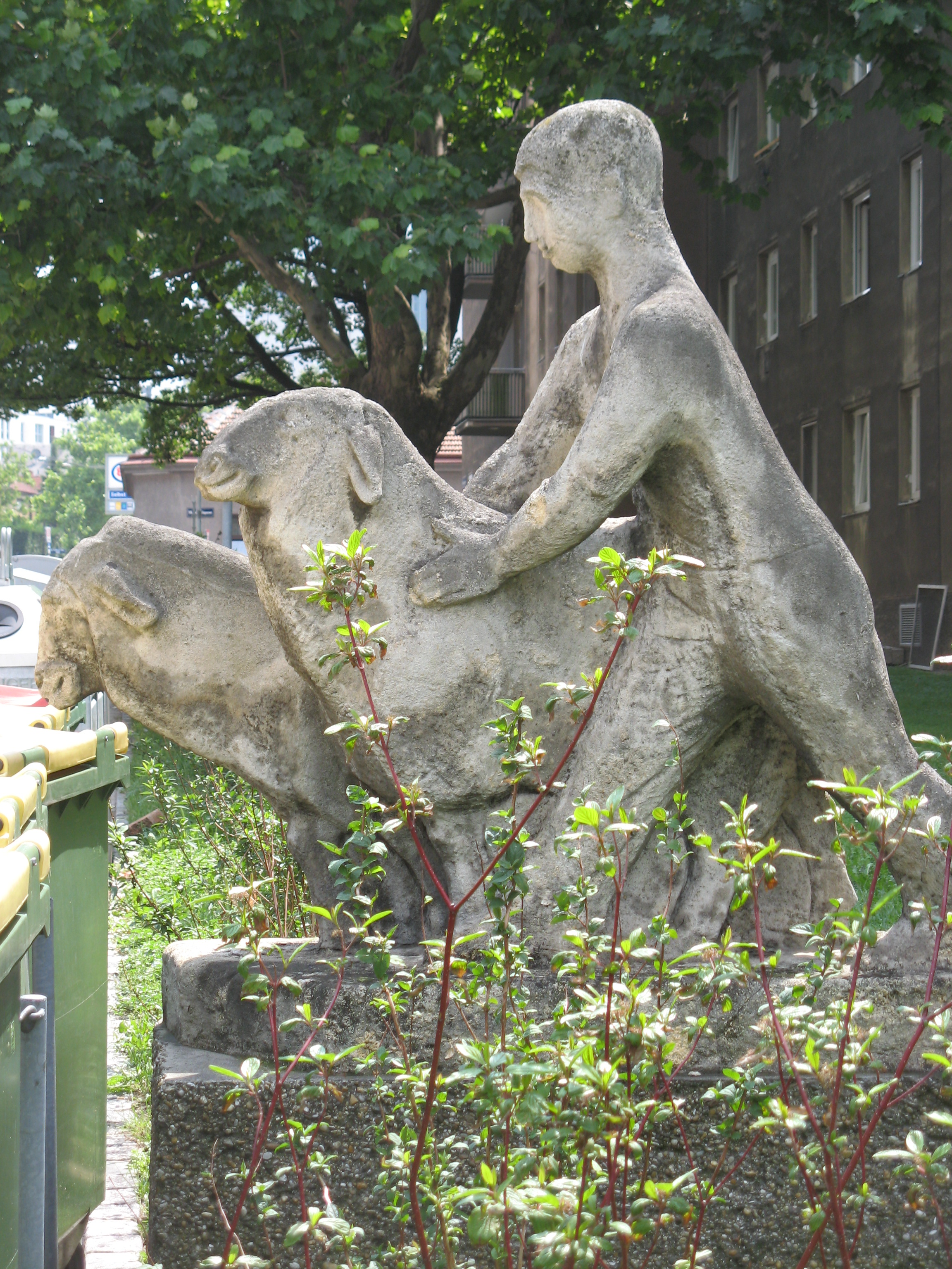 Hirte mit Schafen (1958) von Franz Barwig dem Jüngeren, Puchsbaumgasse 5-7, Wien-Favoriten